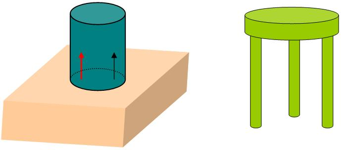 Schéma dont je suis l'auteur. cours de mécanique. Licensing Catégorie:schéma cinématique